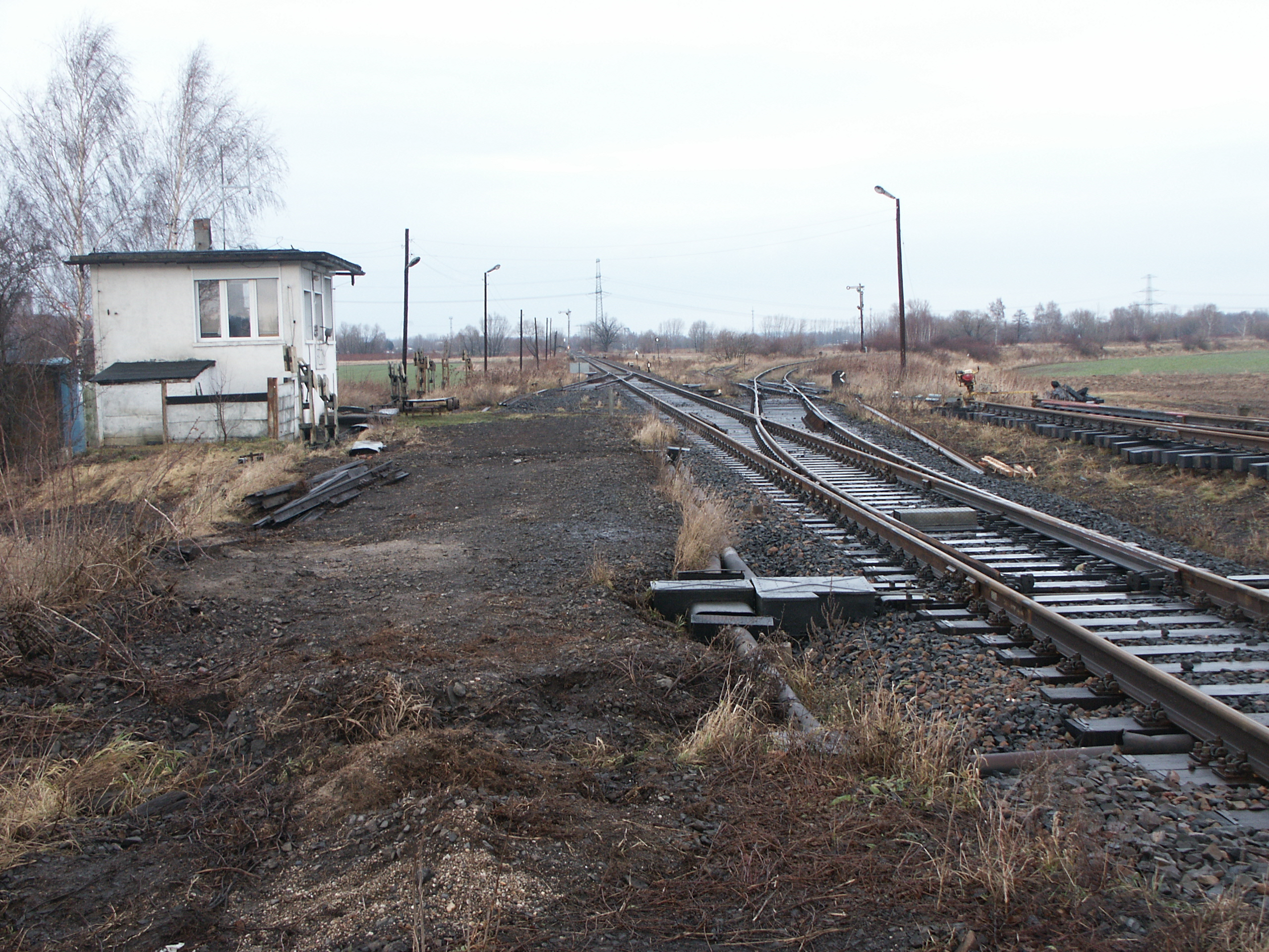 Ręczyn on railway line Zittau-Görlitz (Neißetalbahn), diversion to Zawidów (Seidenberg)